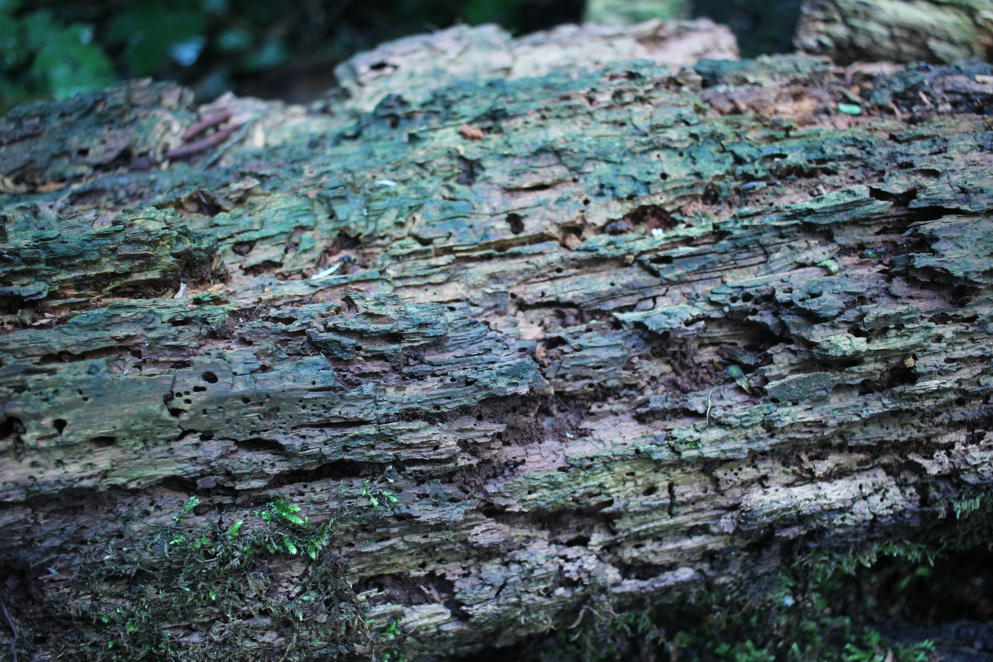 dode bomen in kooilust